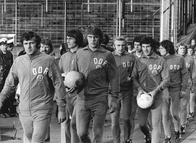 ADN-ZB-Mittelstädt-12.6.74-Hü-BRD-Hamburg: Fußball-WM- Die DDR- Nationalmannschaft auf dem Wege zum Training im Volsparkstadion v.l.n.r.: E. Hamann, H. Irmscher, R. Schnuphase, S. Wätzlich und W. Löwe.